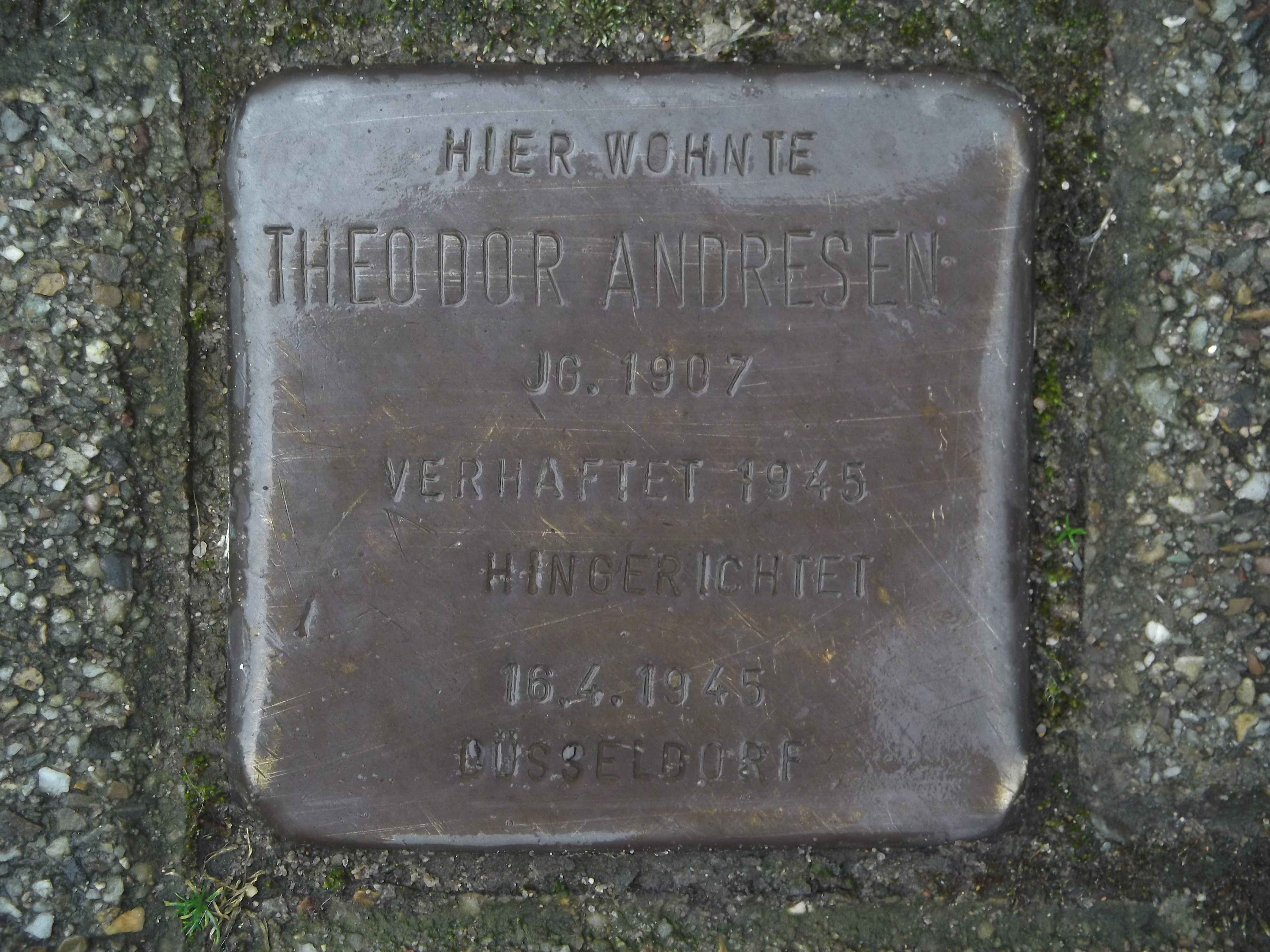 Hier wohnte Theodor Andresen, Jg. 1901, verhaftet 1945, hingerichtet 16.4.1945 Düsseldorf